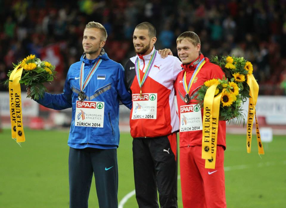 Kariem Hussein, Schweizer Hürdenläufer